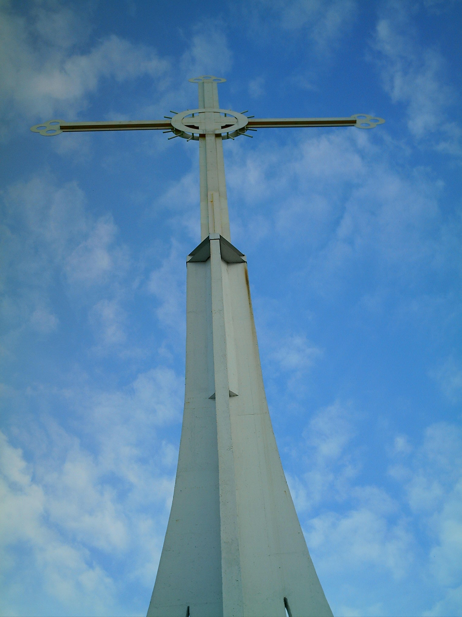 Велики крст на Крстовој Гори код Теслића, у Републици Српској, Босна и Херцеговина